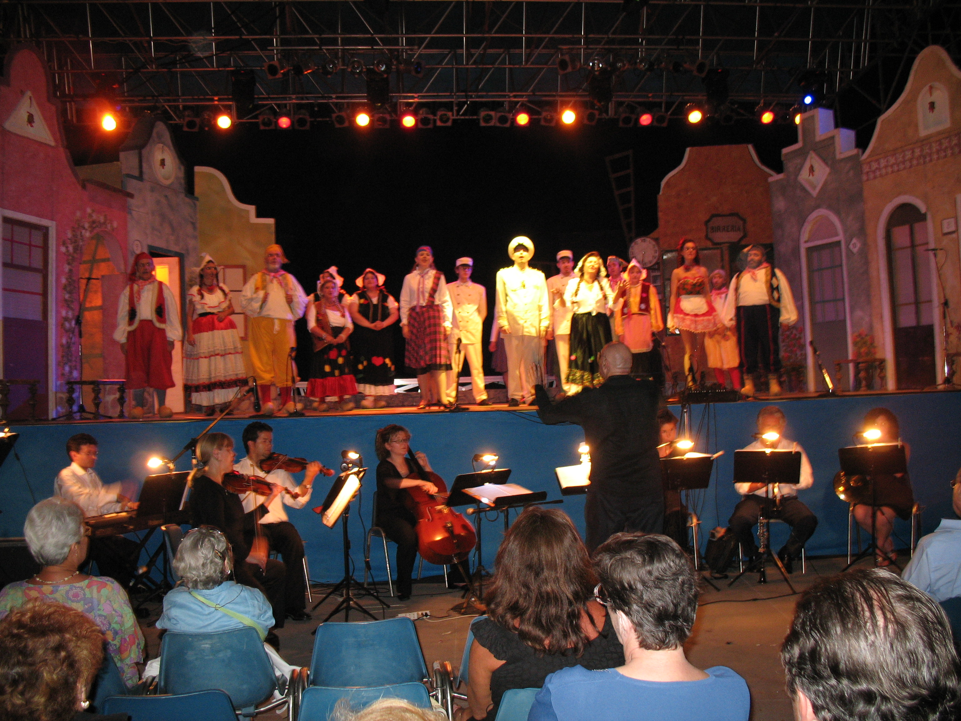 Genova - porto antico Compagnia Alfa Folies - Il paese dei campanelli